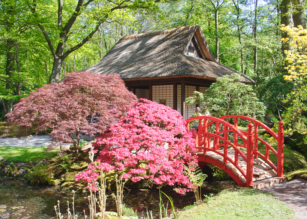 Jardin japonais dans le park de Clingendeal au sud d'est de La Haye